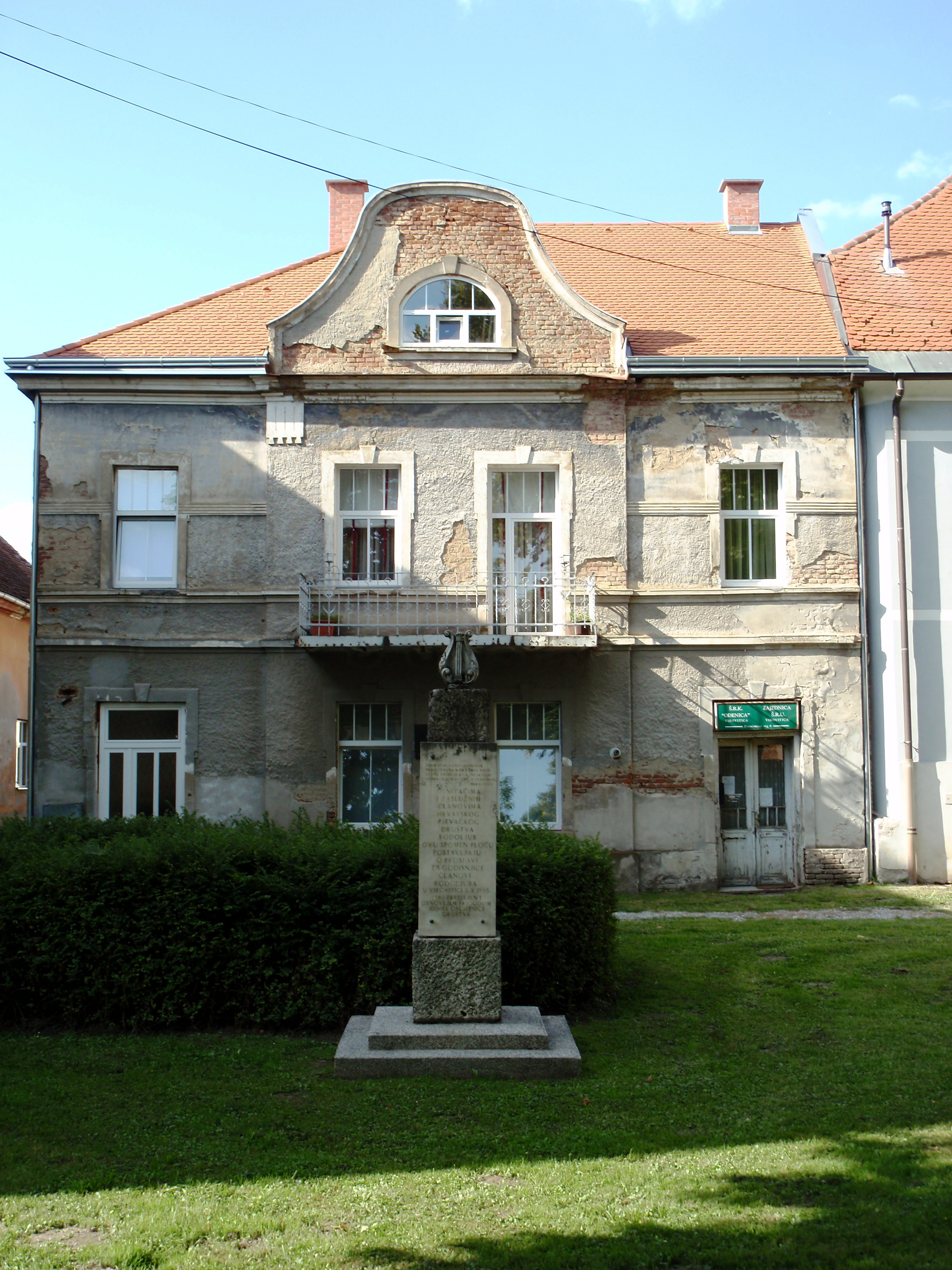 Virovitica